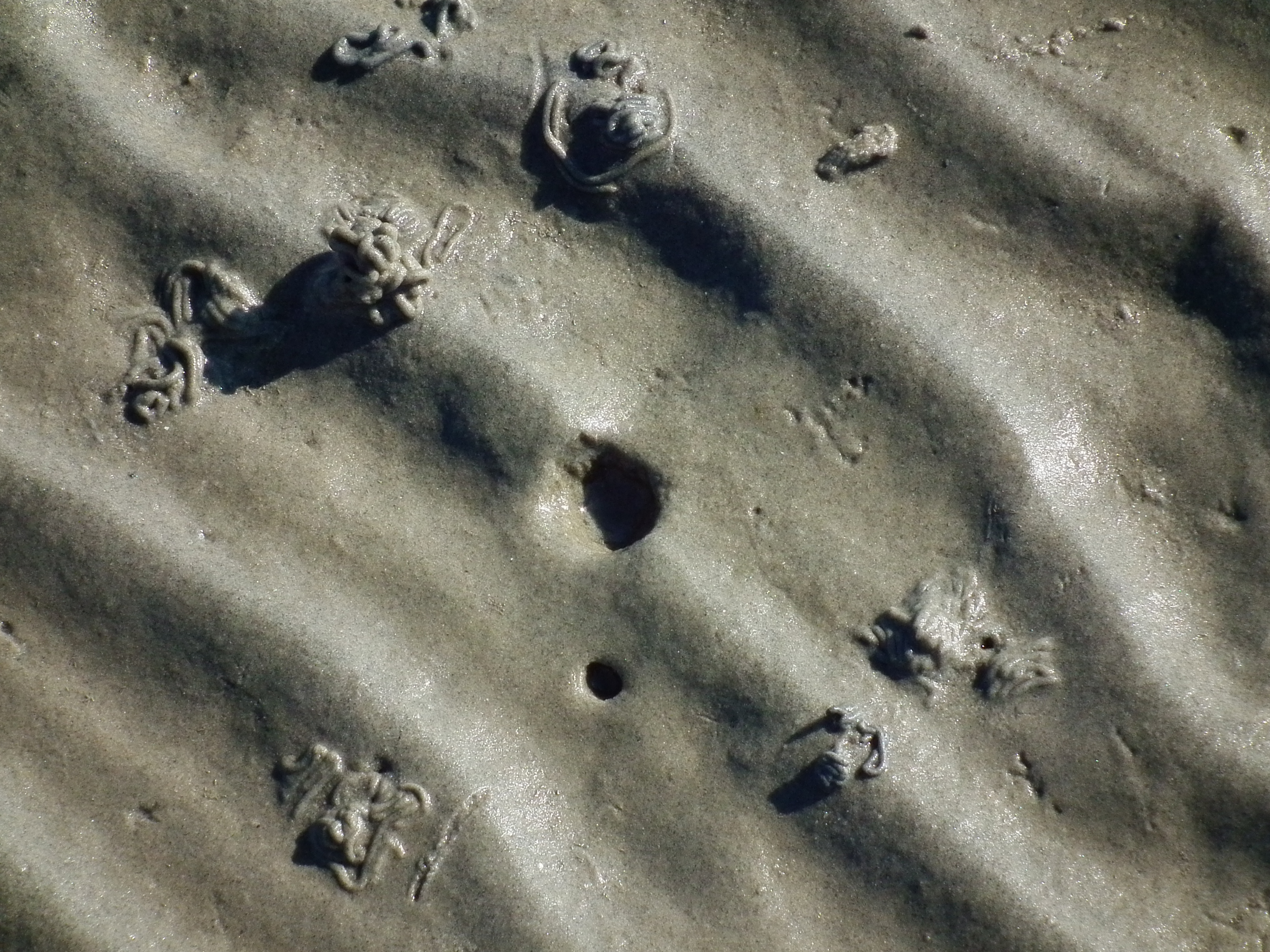 Ein- und Ausgänge von Röhren des Wattwurm (Arenicola marina), fotografiert im Watt vor der ostfriesischen Nordseeinsel Juist (Niedersachsen, Deutschland)